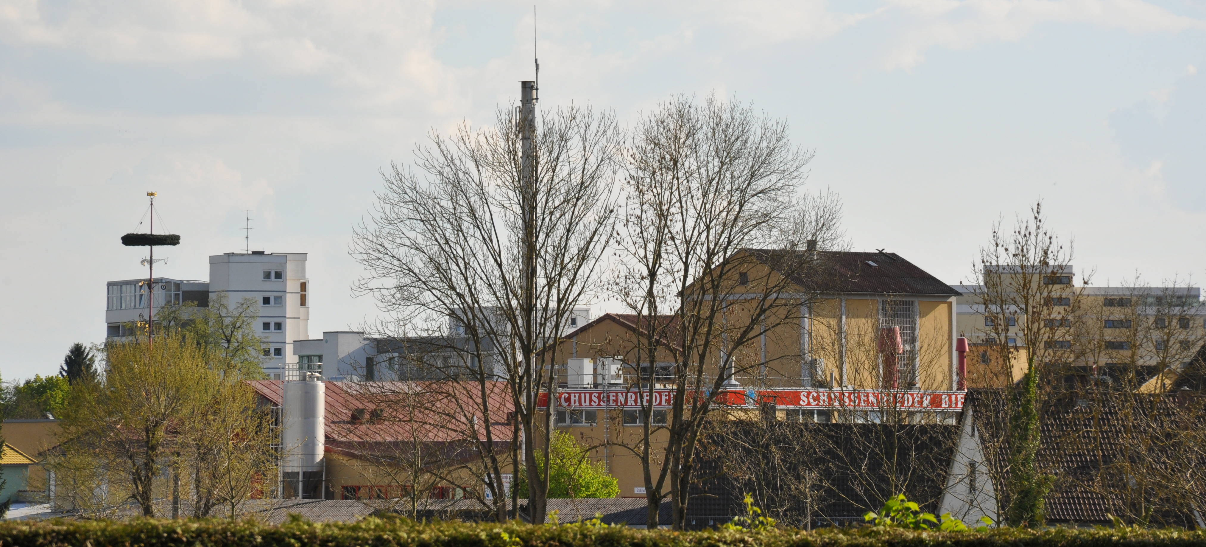 Schussenrieder Brauerei, vom Kloster aus gesehen